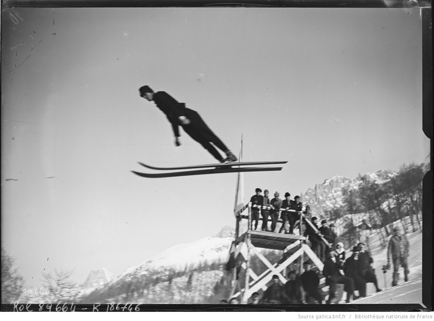 [Jeux olympiques d'hiver de] Chamonix, 2/2/24, Buchberger, tchéco[-slovaque, saut à ski de l'épreuve du combiné nordique] : [photographie de presse] / [Agence Rol]